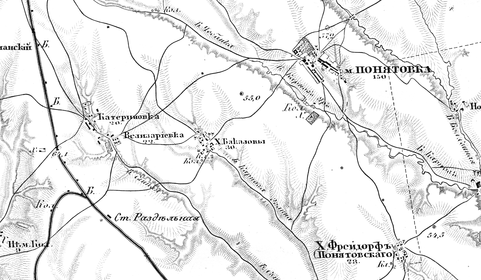 станция Раздельная на военно-топографической карте Российской Империи 1877г.